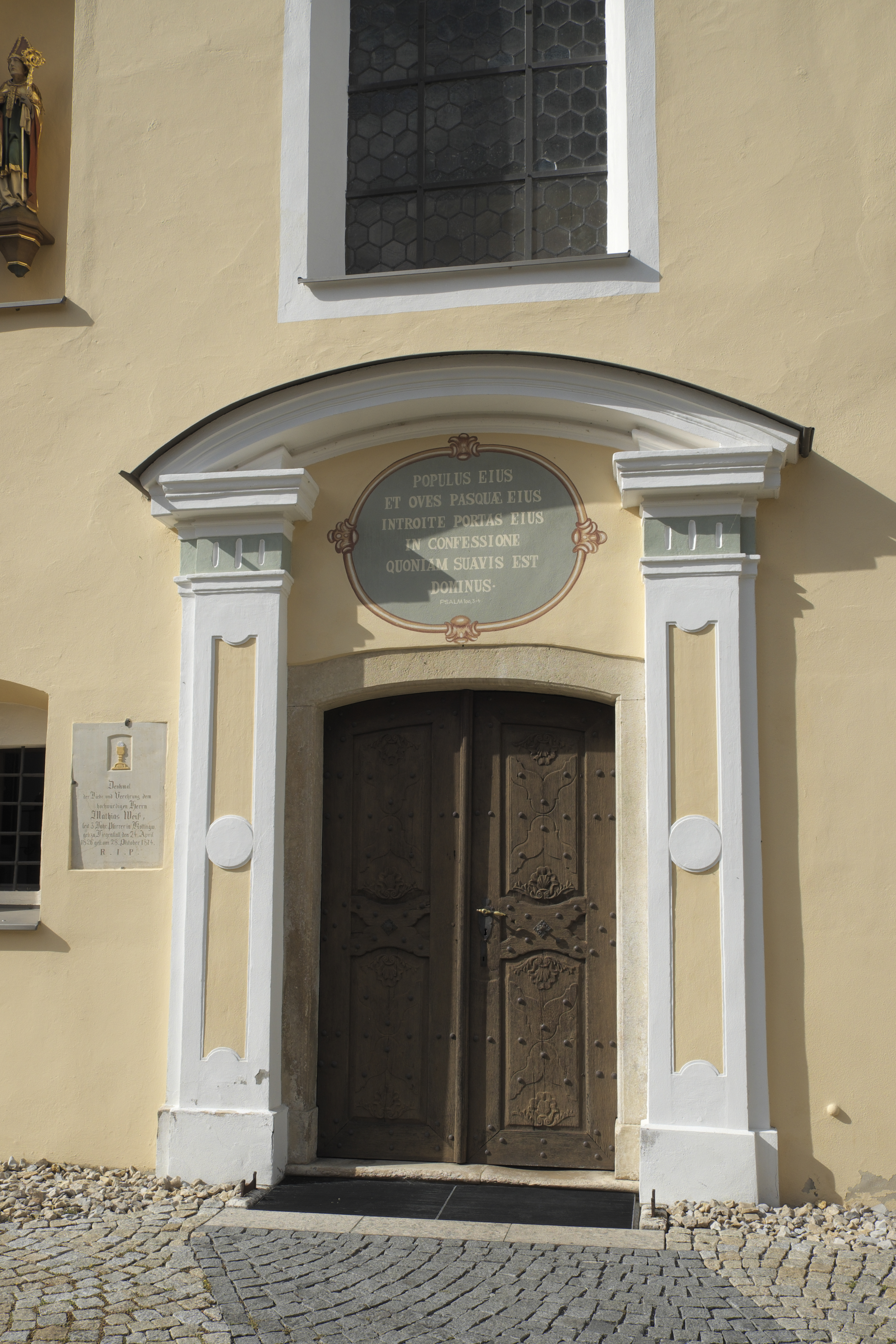 Katholische Pfarrkirche St. Vitus in Kottingwörth (Beilngries) im oberbayerischen Landkreis Eichstätt (Bayern/Deutschland), Portal